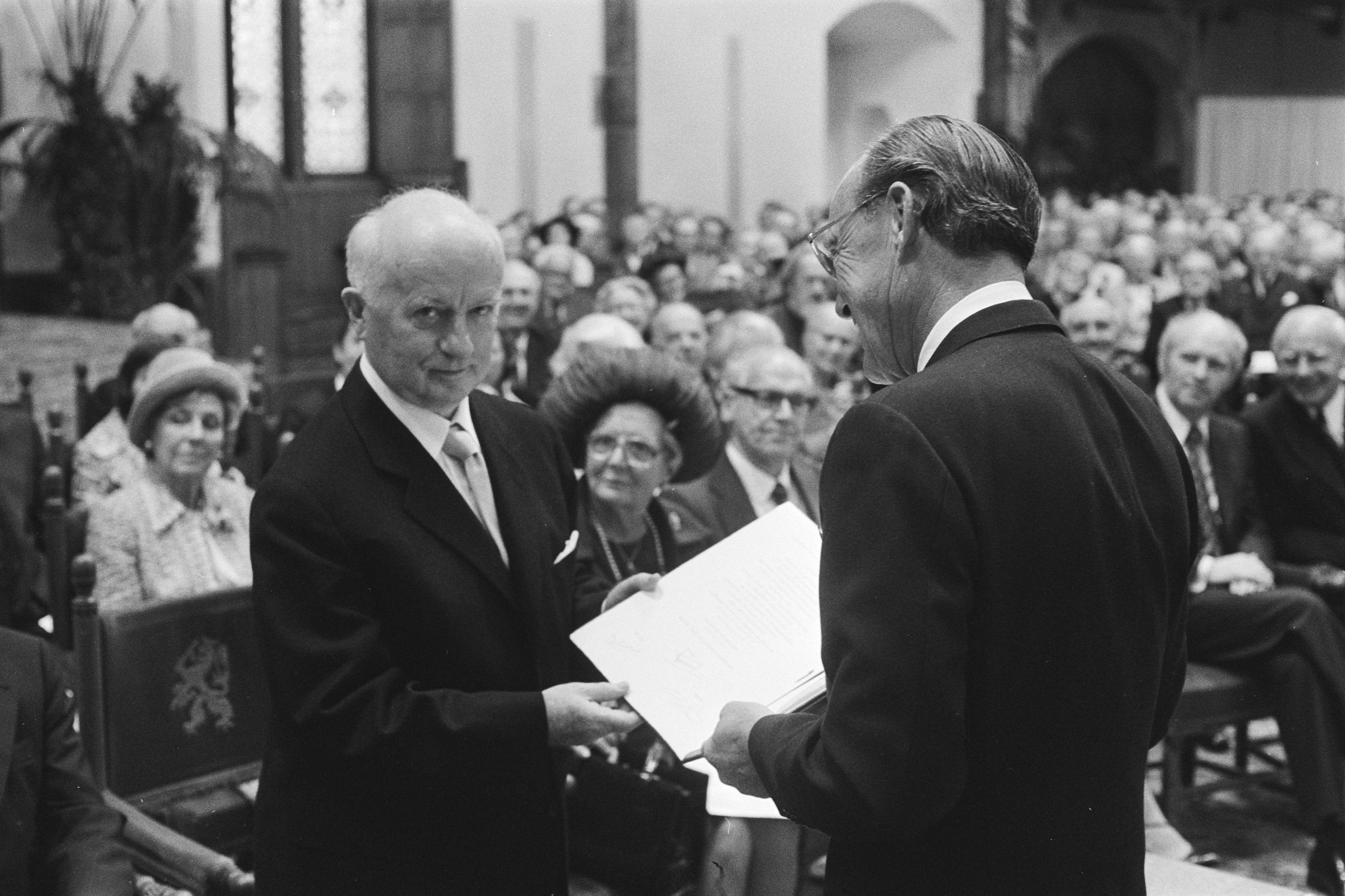 Prins Bernhard overhandigt Erasmusprijs aan Zwitserse prof. Werner Kaegi (midden koningin Juliana). Datum 27 september 1977 Prins Bernhard overhandigt Erasmusprijs aan Zwitserse prof. Werner Kalgi (midden Hare Majesteit ); Bernhard, prins; Erasmusprijs; Juliana, koningin; Kaigi Werner; koninginnen; prijzen; prinsen; professoren